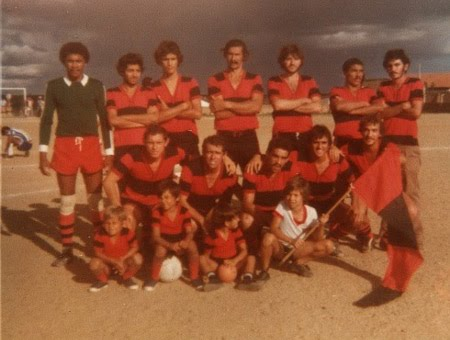 Primeiro Campeonato Tabirense. Título rubro-negro.